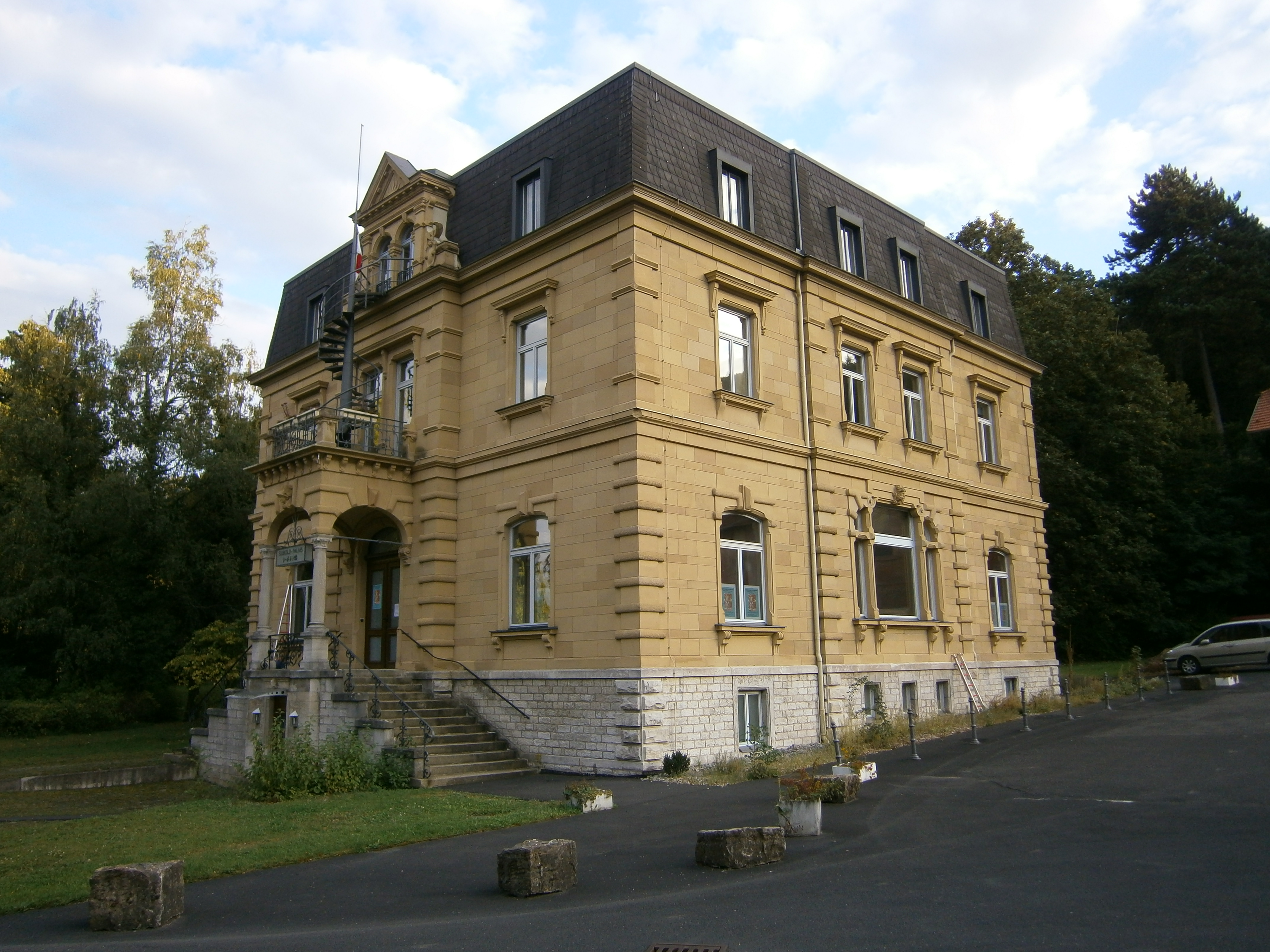 Würzburg - Frankfurter Straße 87 Sieboldmuseum